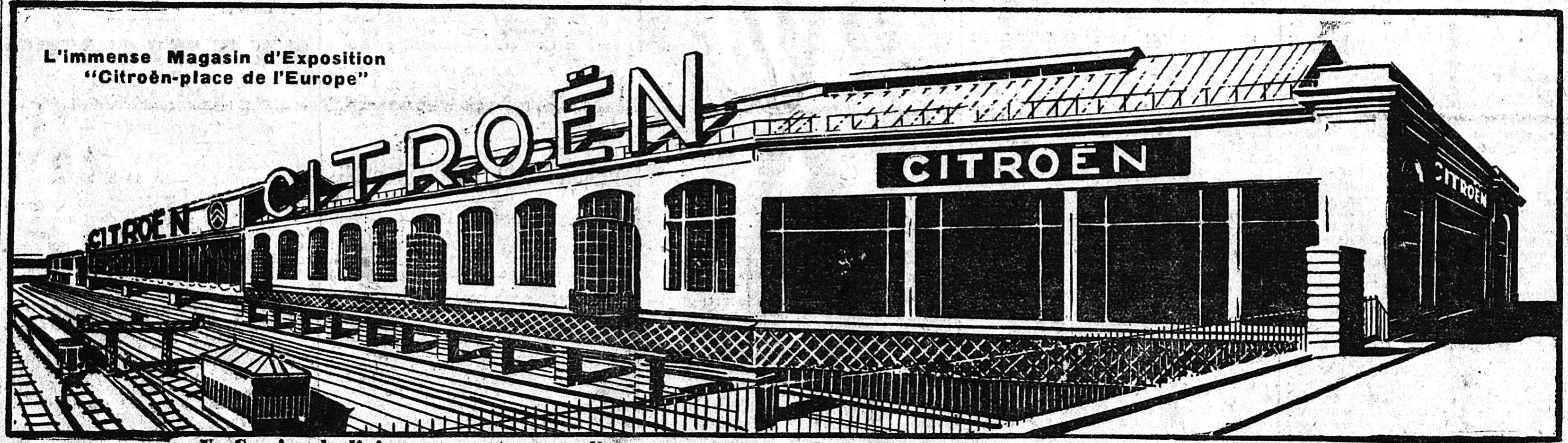 Publicité pour l'ouverture en 1931 du magasin Citroën de la place de l'Europe (aménagé dans les anciennes messageries de la gare Saint-Lazare)